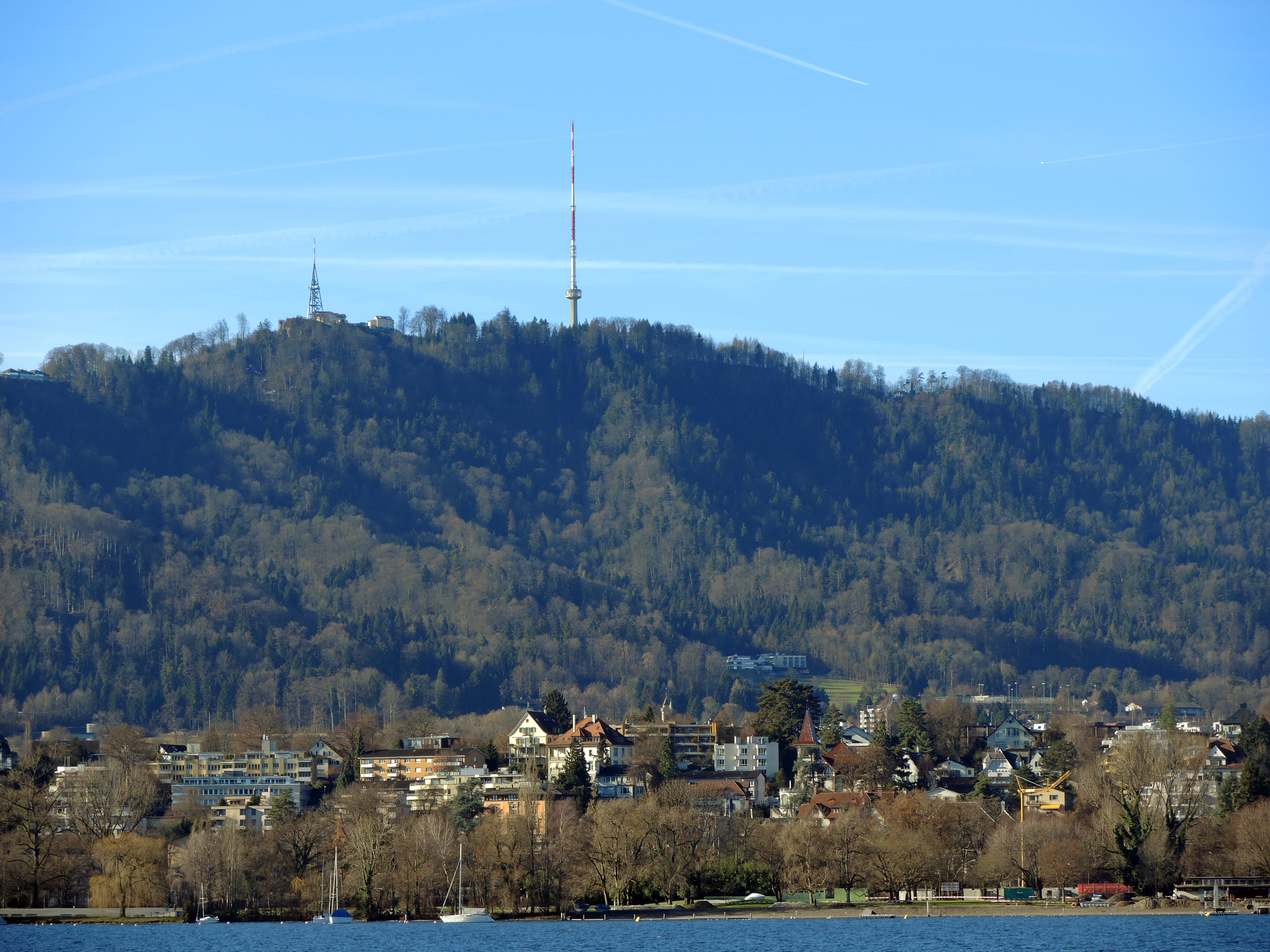 Oppidum Uetliberg bei Zürich